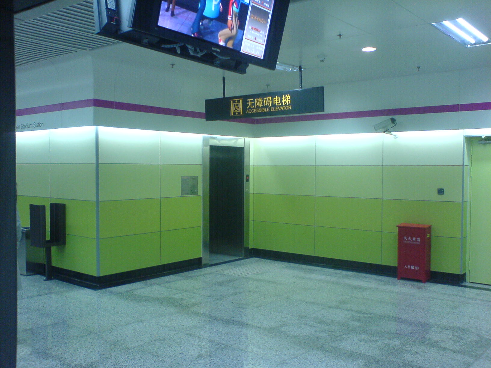 源深体育中心站站台